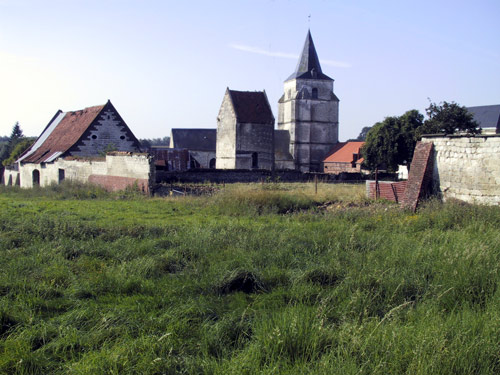 Vue générale de Basseux